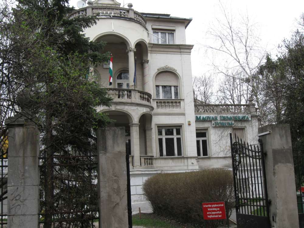 A Magyar Demokrata fórum székháza, Budapest, 2. ker., Szilágyi Erzsébet fasor 73.